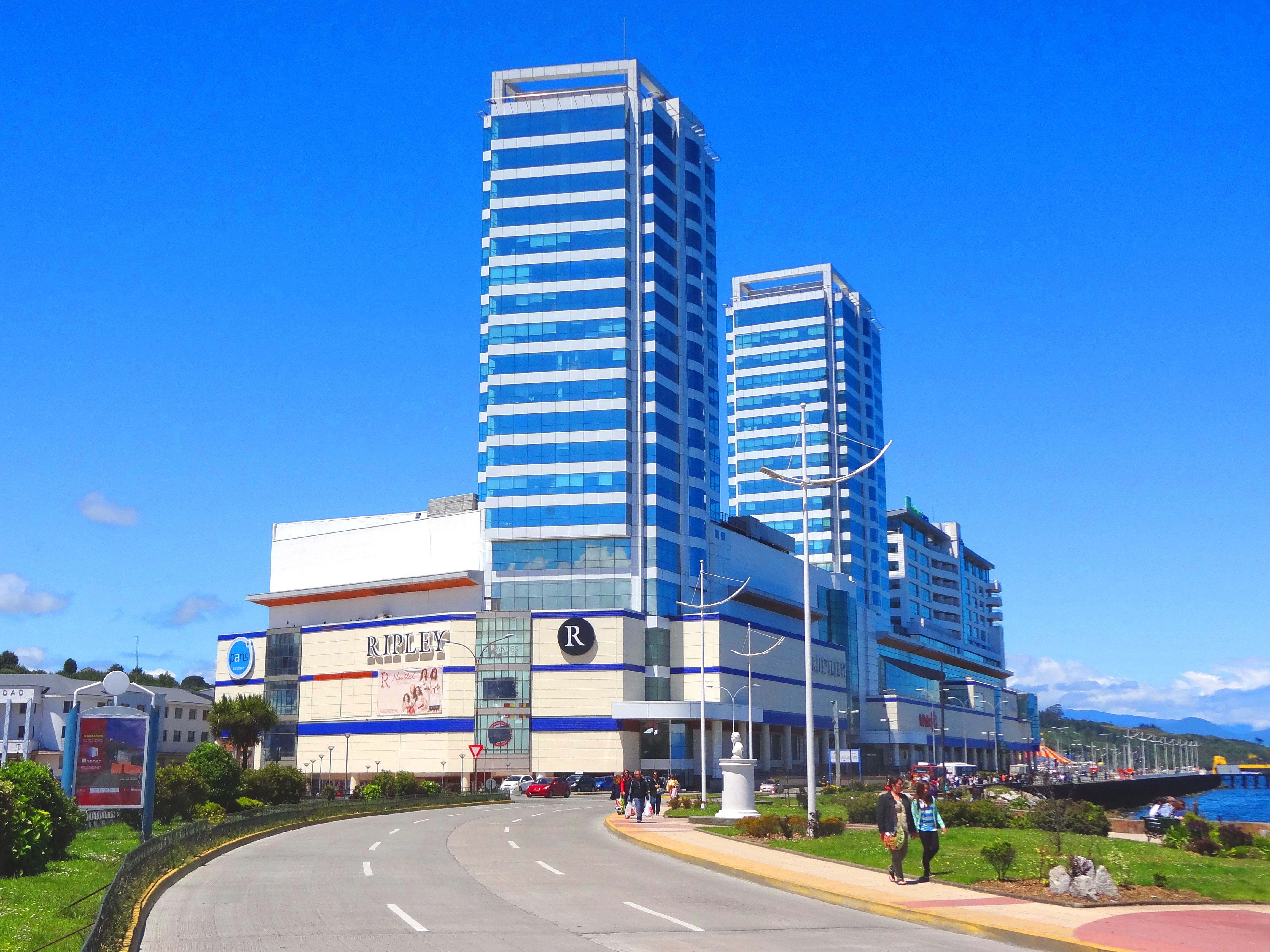 La tecnología de mercadeo y el símbolo del Poder